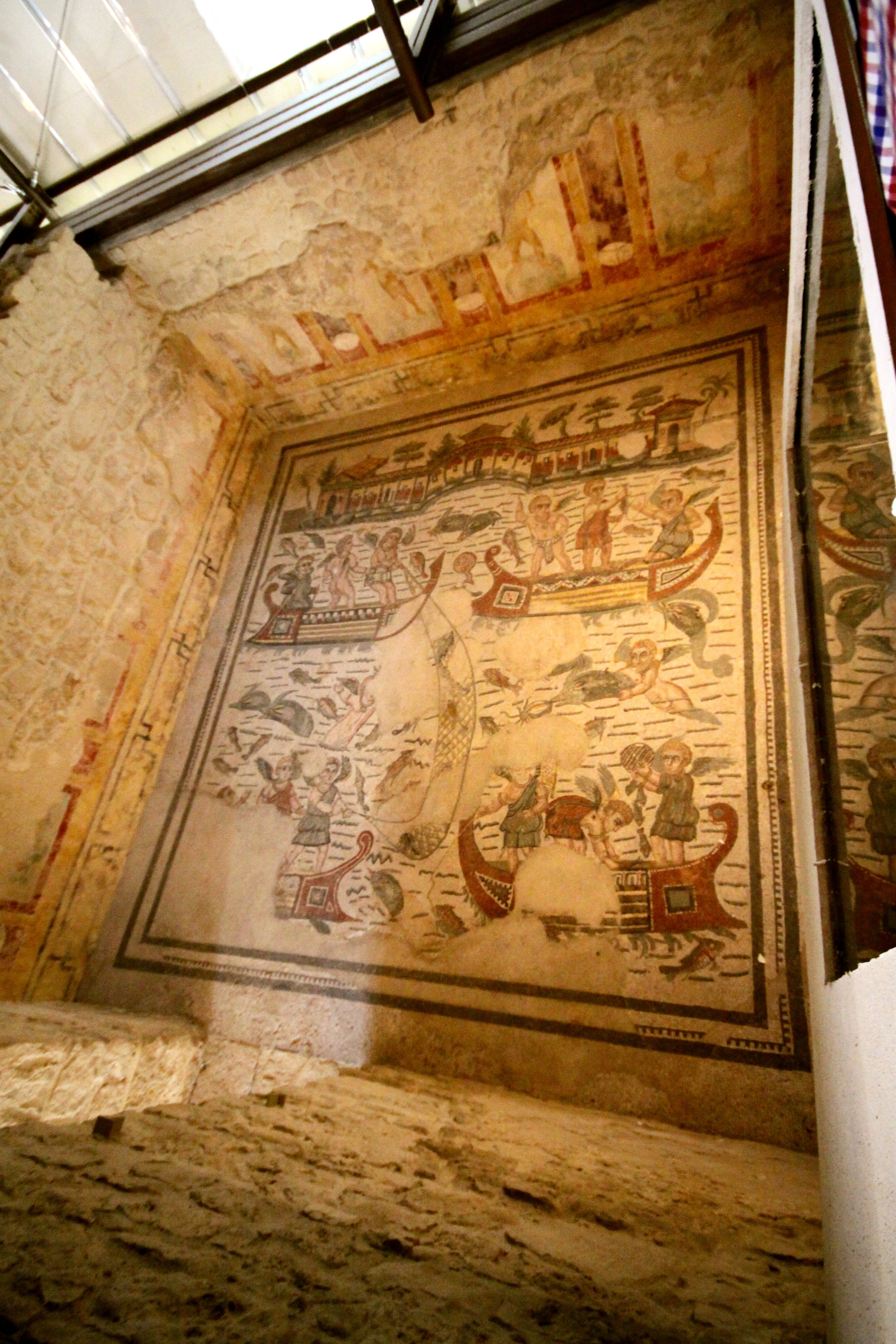 Ancient Roman mosaics in Villa del Casale (Piazza Armerina)